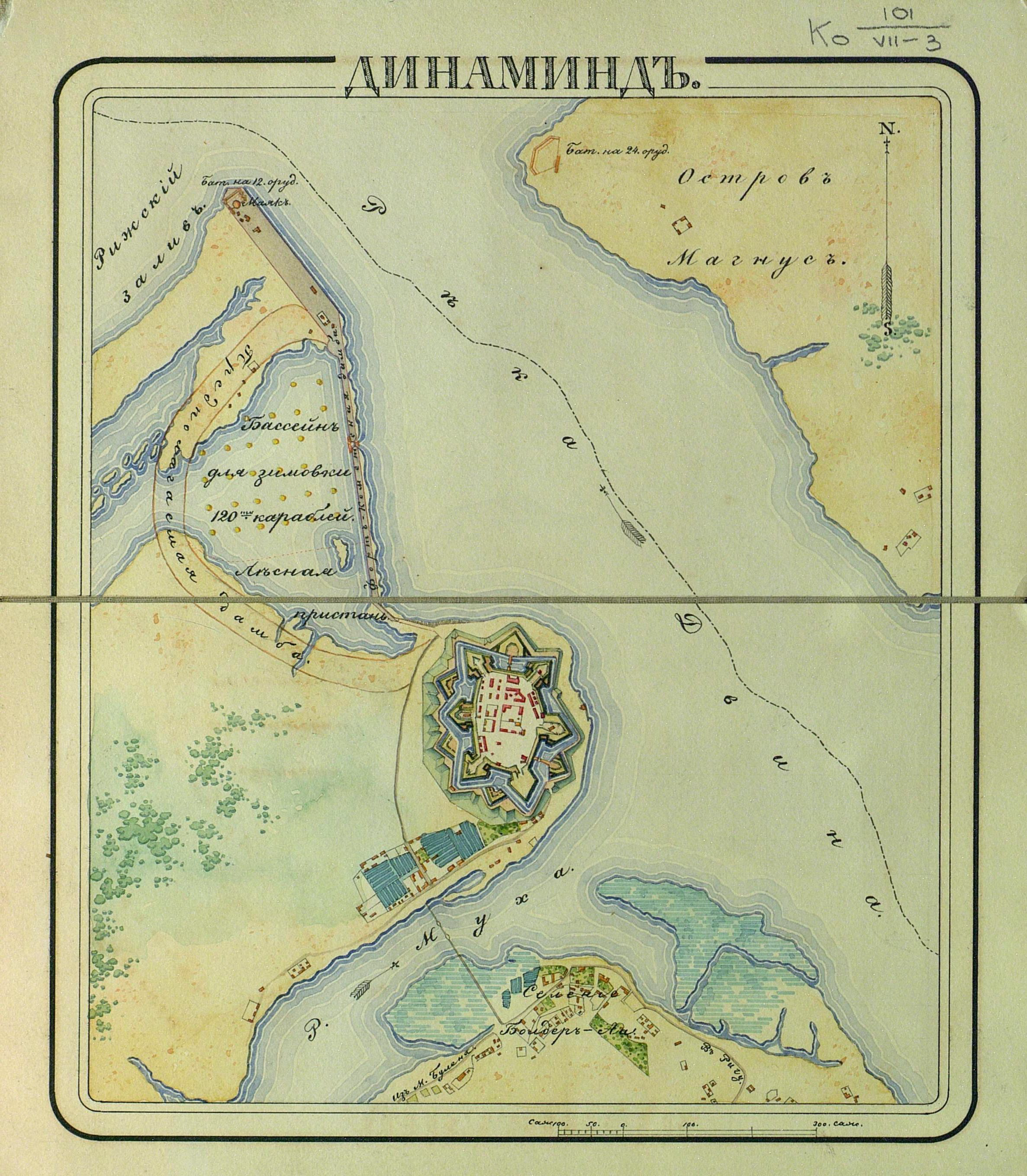 из "Атласа крепостей Российской империи"